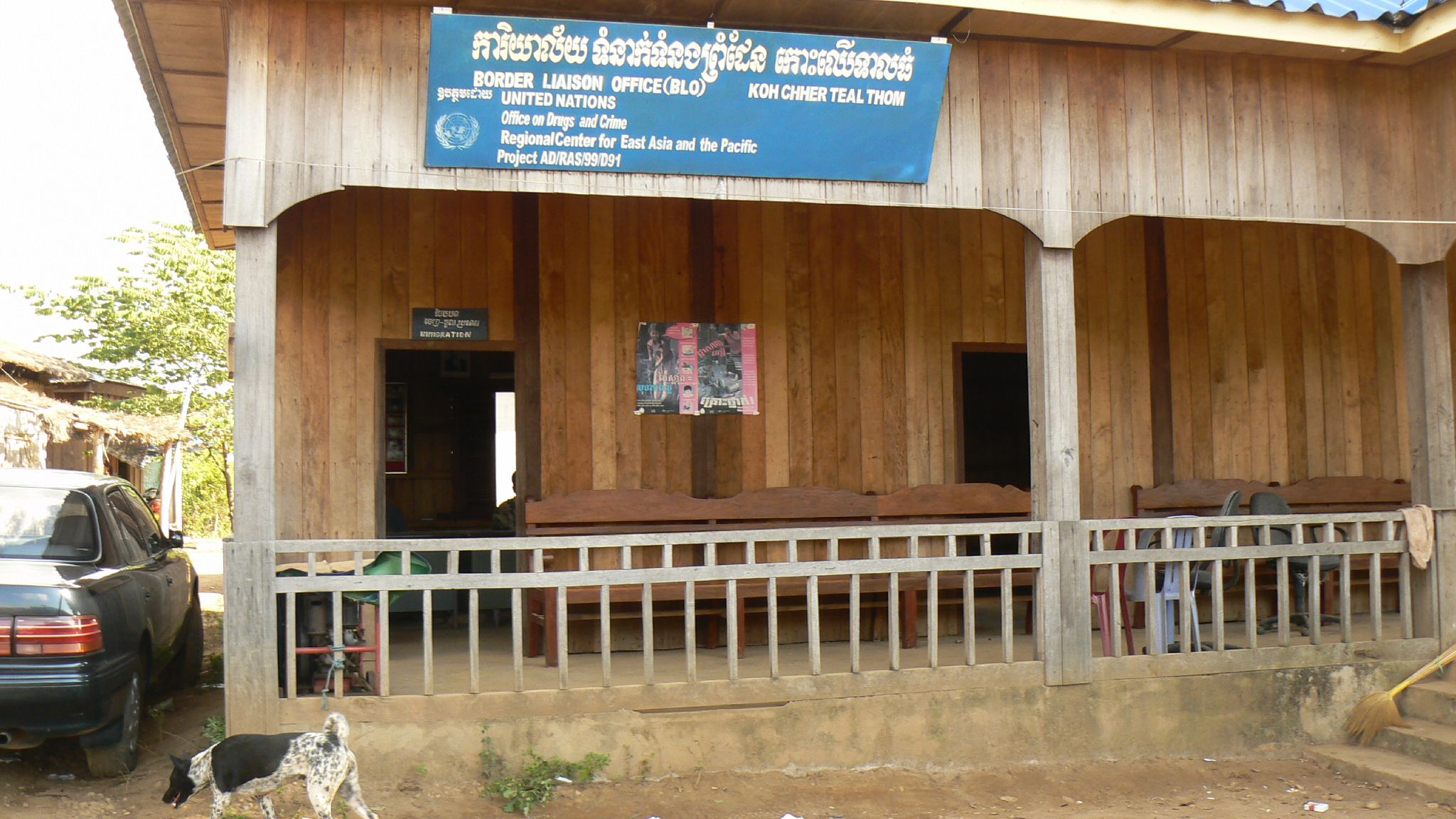 Lao Cambodian border post.